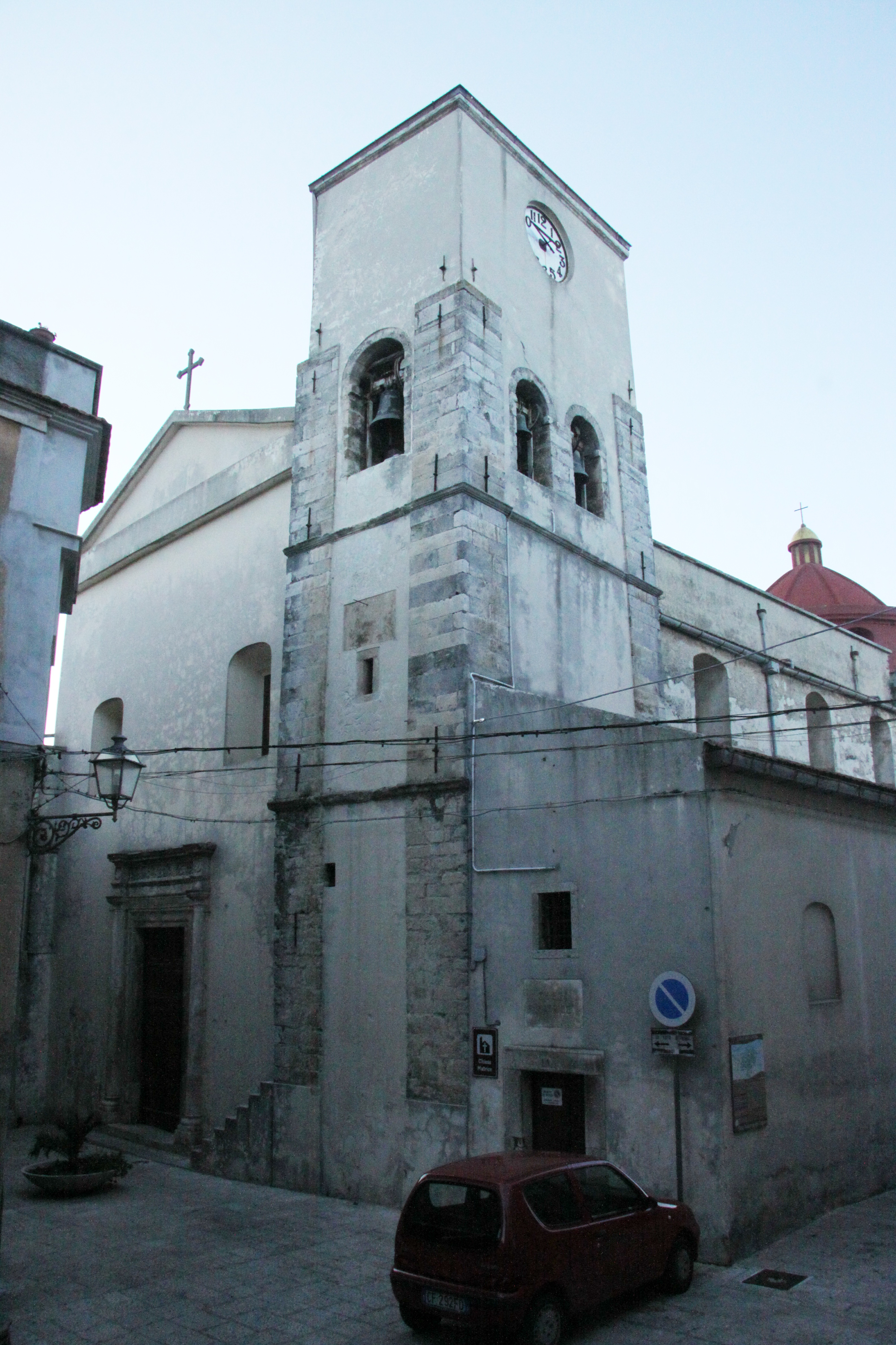 Chiesa Matrice di Santa Maria Assunta This is a photo of a monument which is part of cultural heritage of Italy.